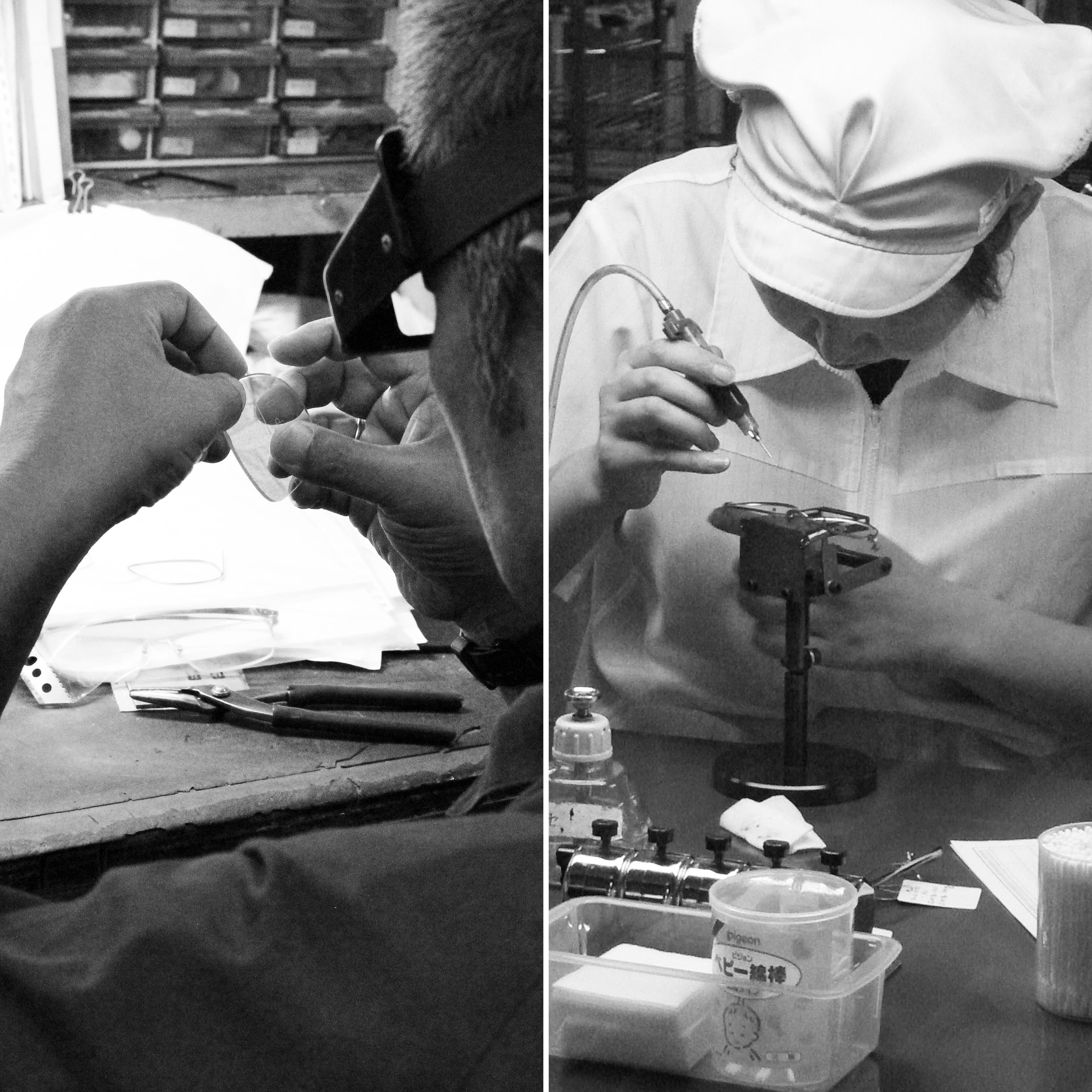 Processus de fabrication d'une monture Charmant